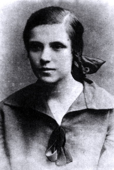 Ларыса Міклашэвіч (Геніюш) - гімназістка.